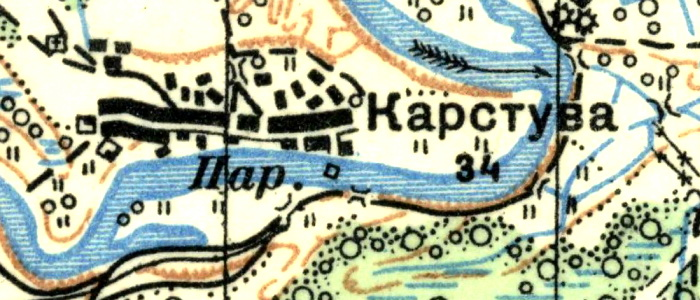 Топографическая карта Ленинградской области, квадрат О-35-21-В (Нарва), деревня Коростель